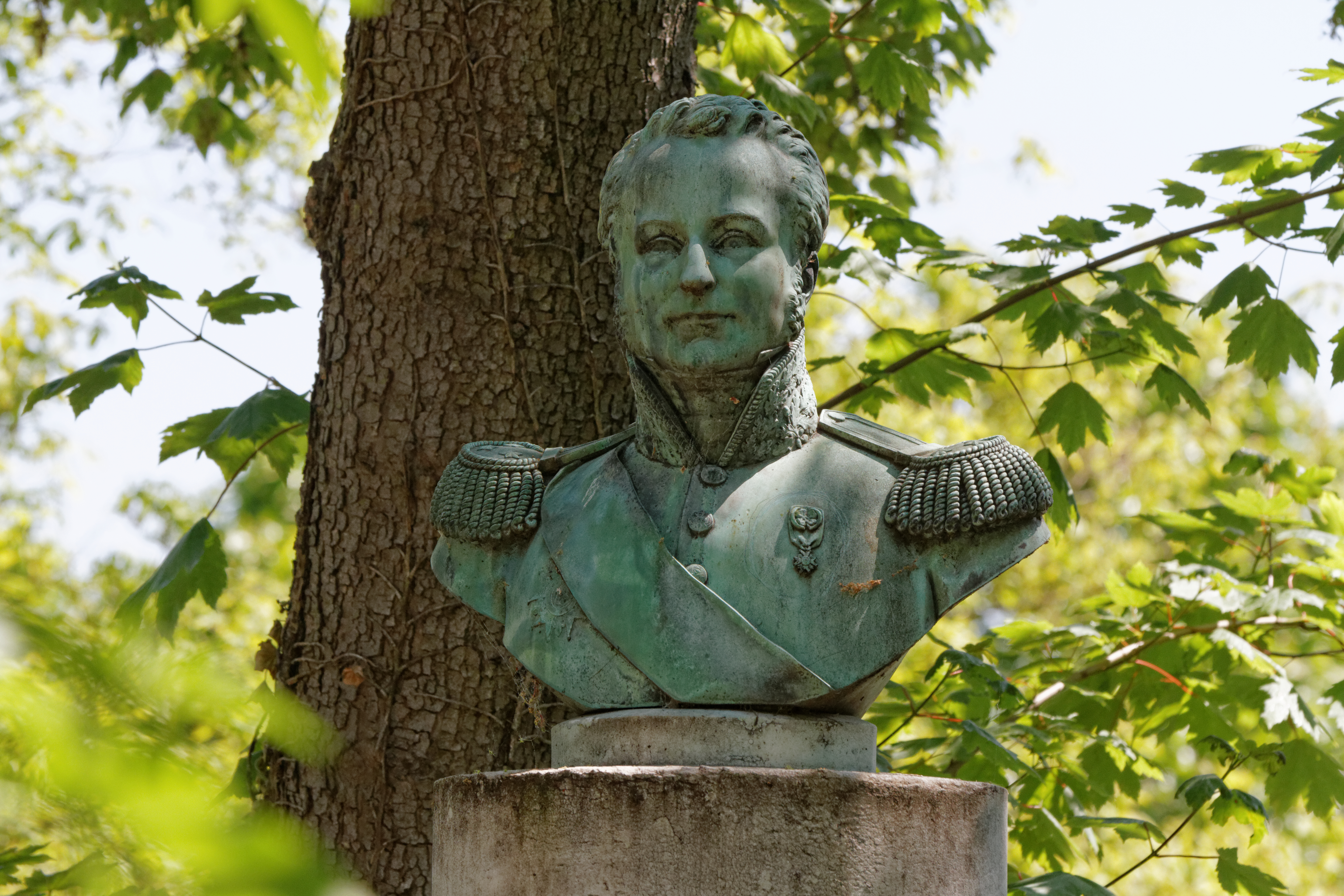 Colonne en marbre blanc surmontée d'un buste en bronze du général Charles-Étienne-François Ruty.